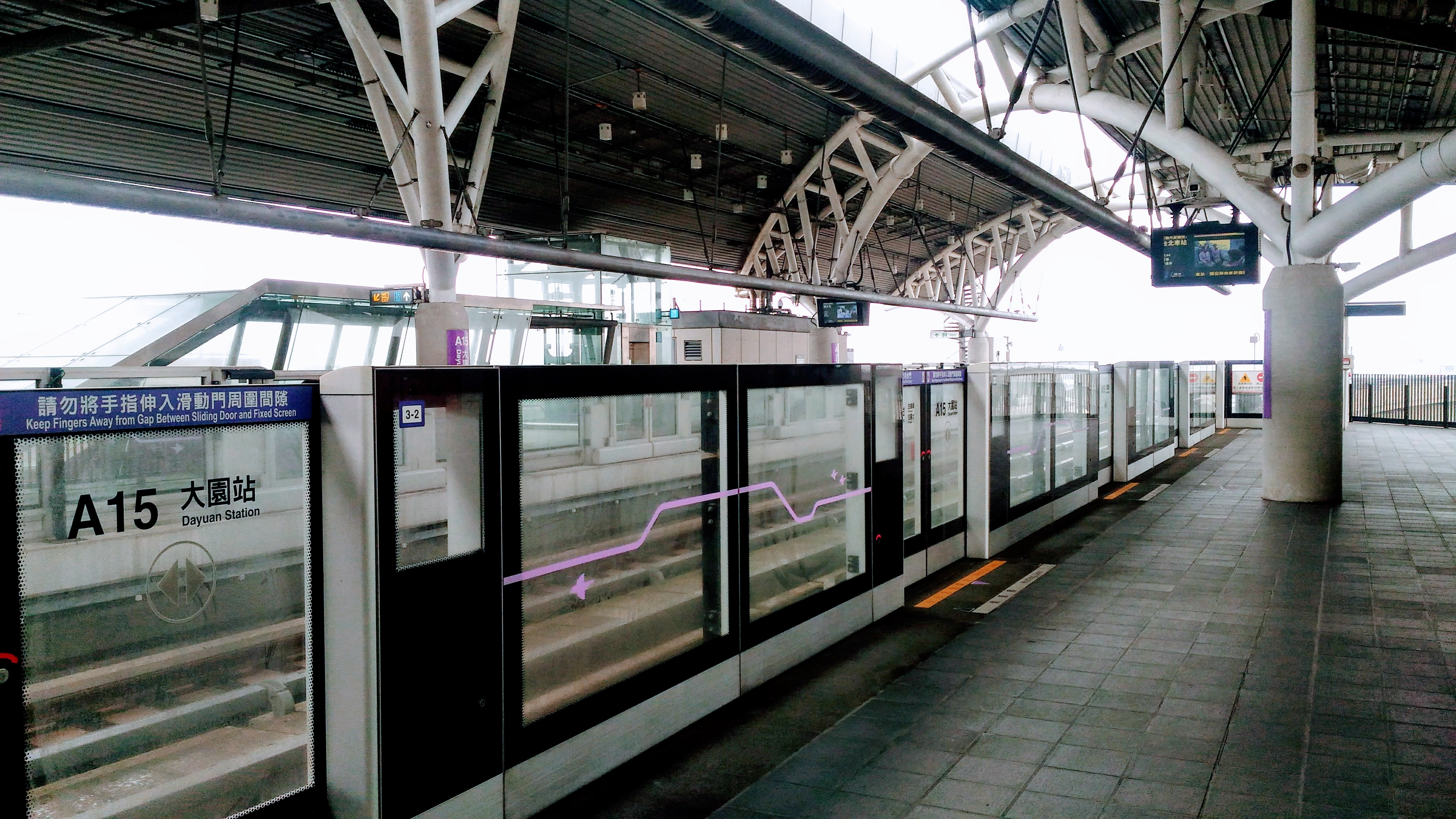 中文（台灣）: 桃園國際機場捷運大園站第二月台。